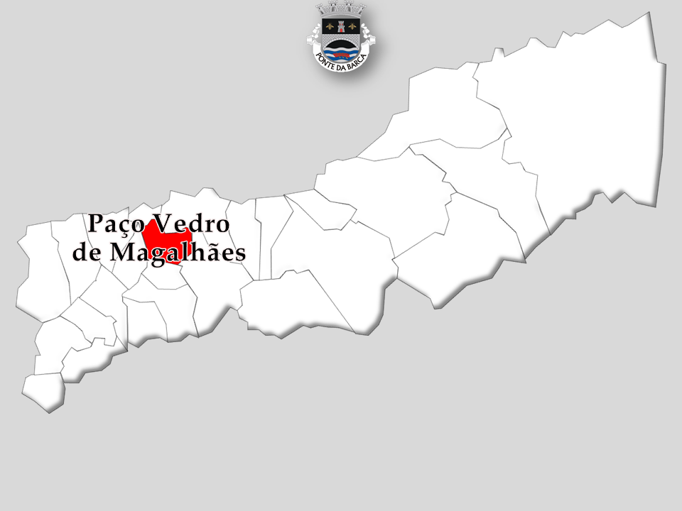 Censos 1864/2011